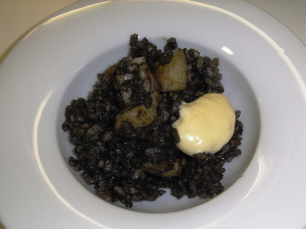 Plato de arroz negro.